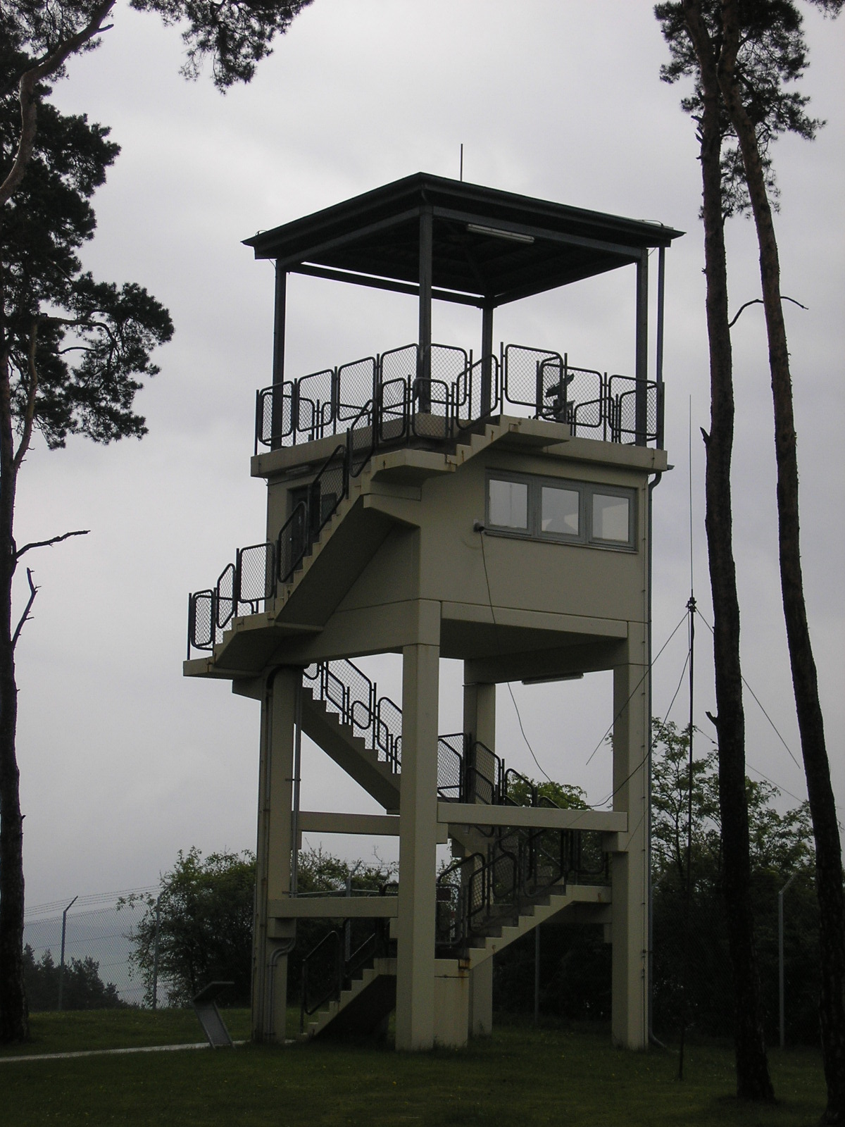 Der ehem. US-Wachturm am Point Alpha (Rhön).